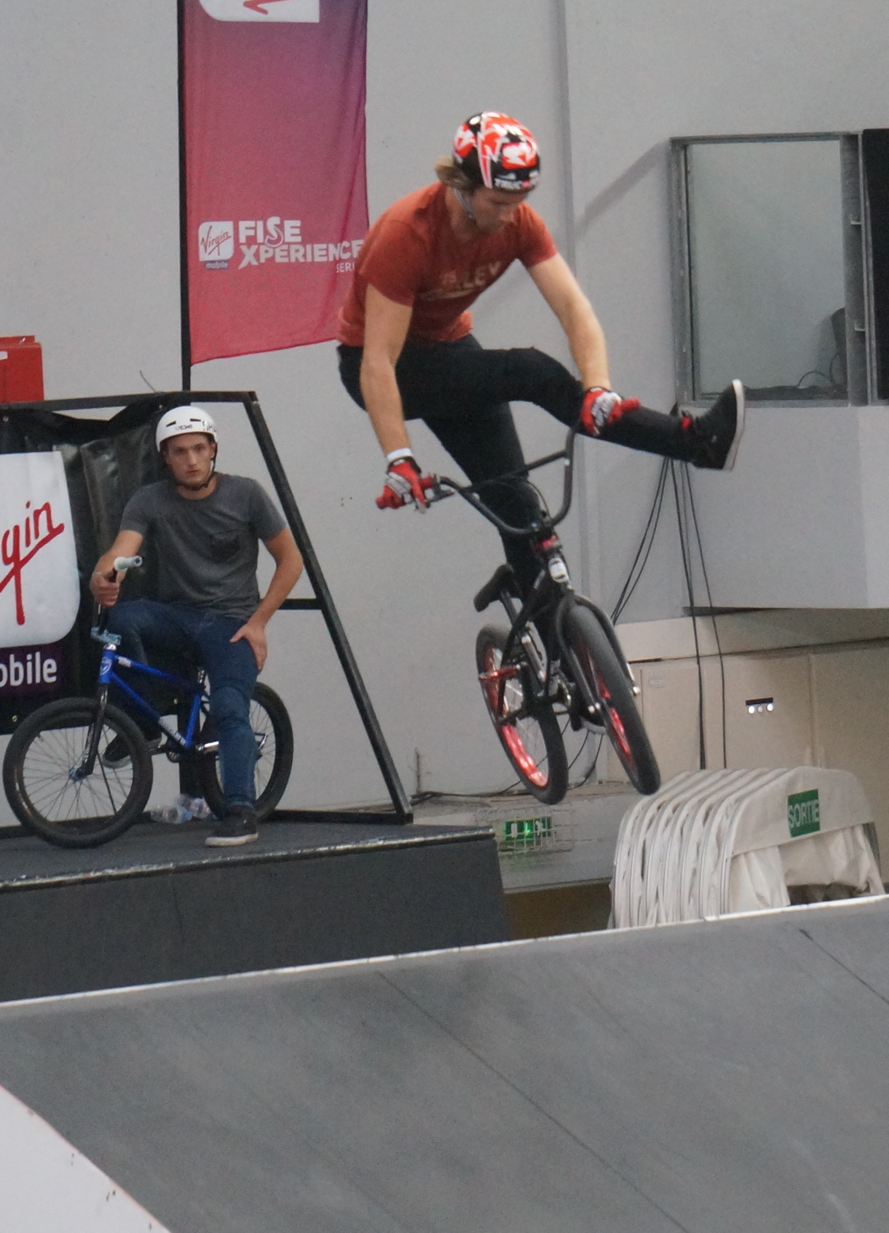 lors de FISE Xpérience Reims 2015.